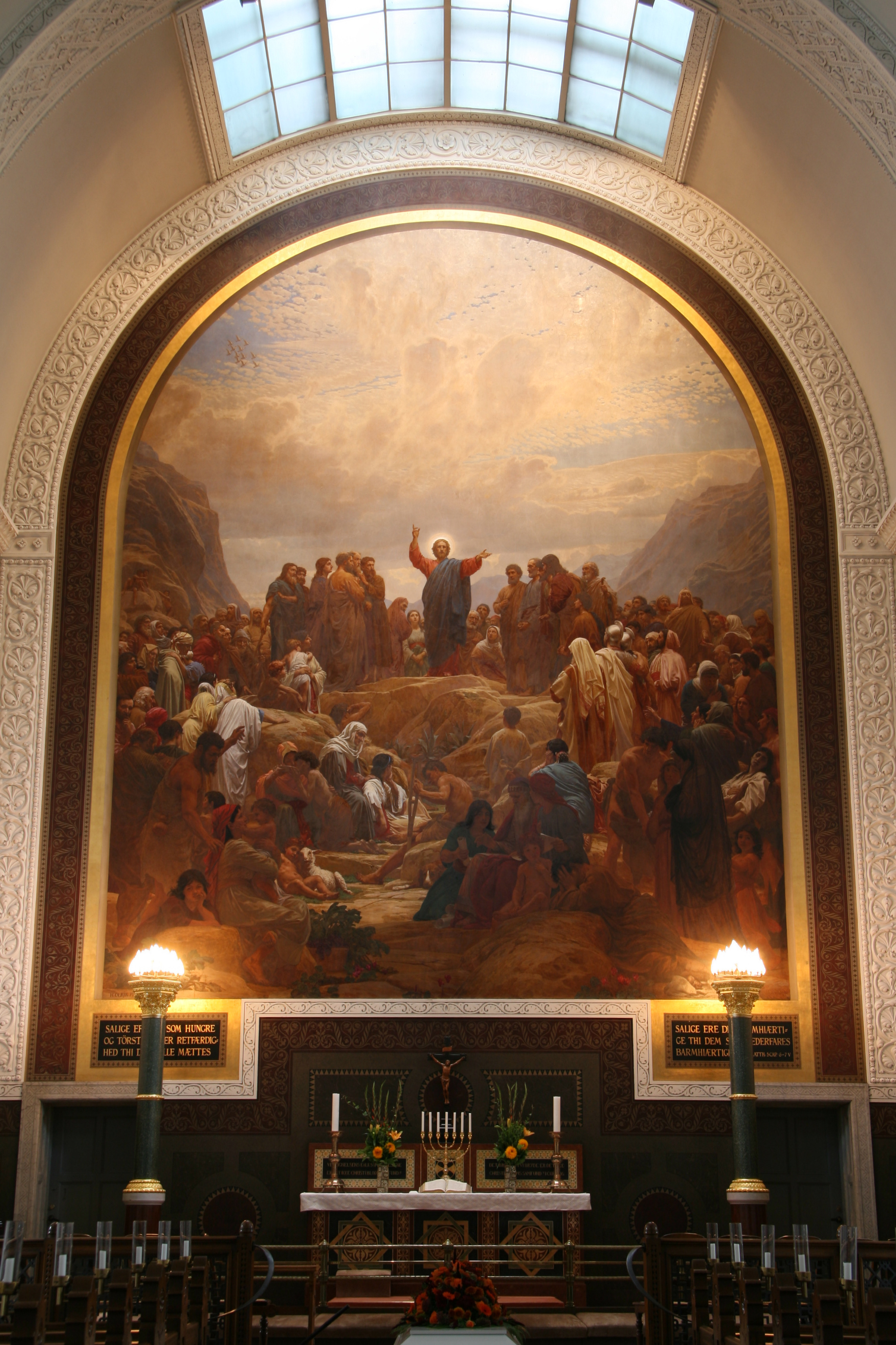 Sankt Matthæus Kirkes altervæg, udført af H. Olrik med hjælp af C.N. Overgaard